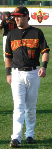 Jason Pridie @ Frontier Field in 2008 06:14, 9 June 2008 . . Phil5329 . . 184×523 (19 KB)